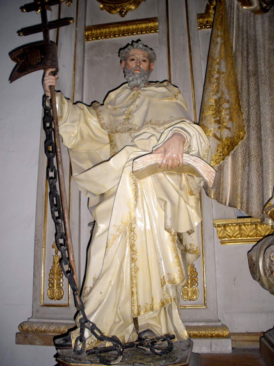 Church of San Andrés, Segovia